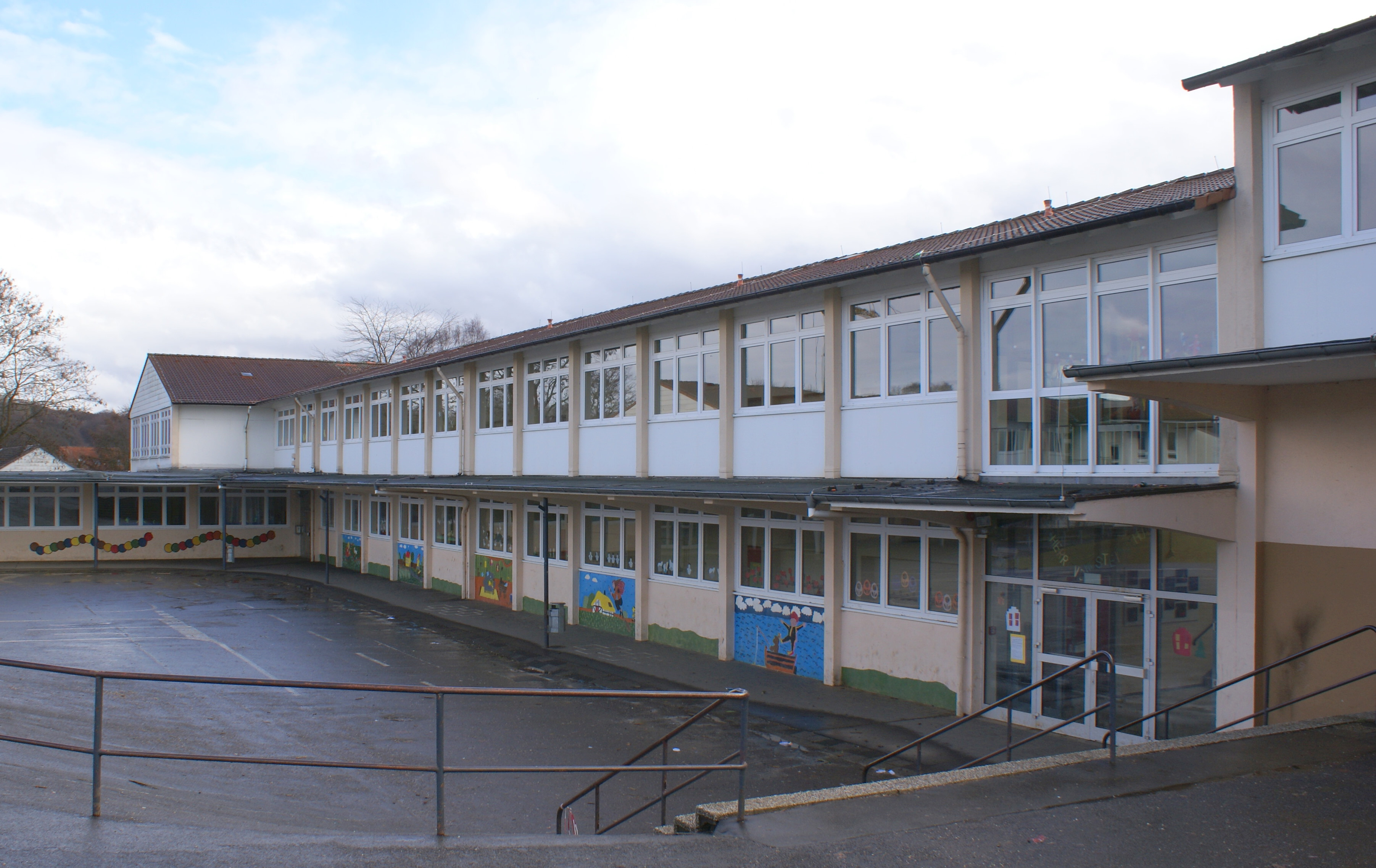 Freiherr-vom-Stein-Schule, Grundschule der Stadt Hemer in Sundwig